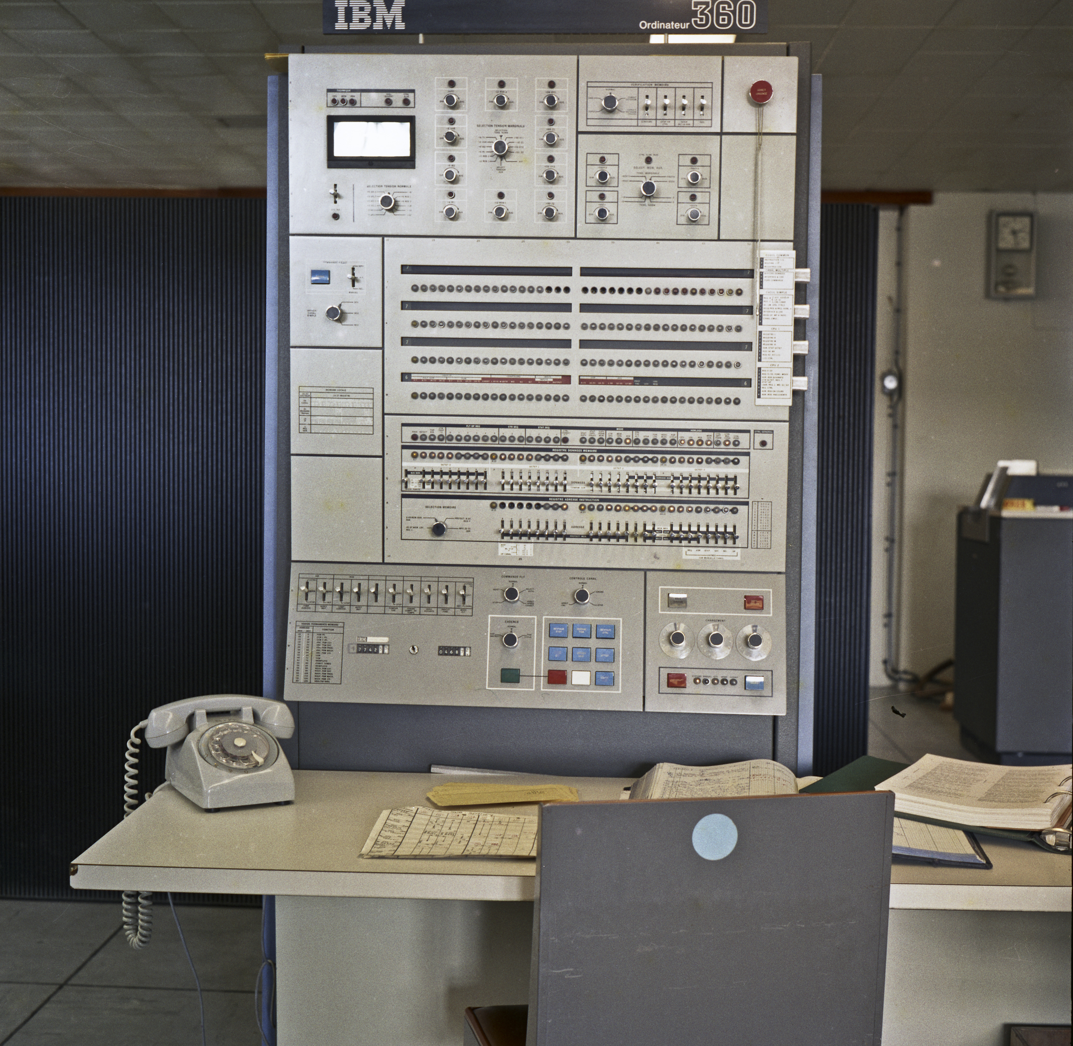 Mécanographie, Centre national de recherches zootechniques